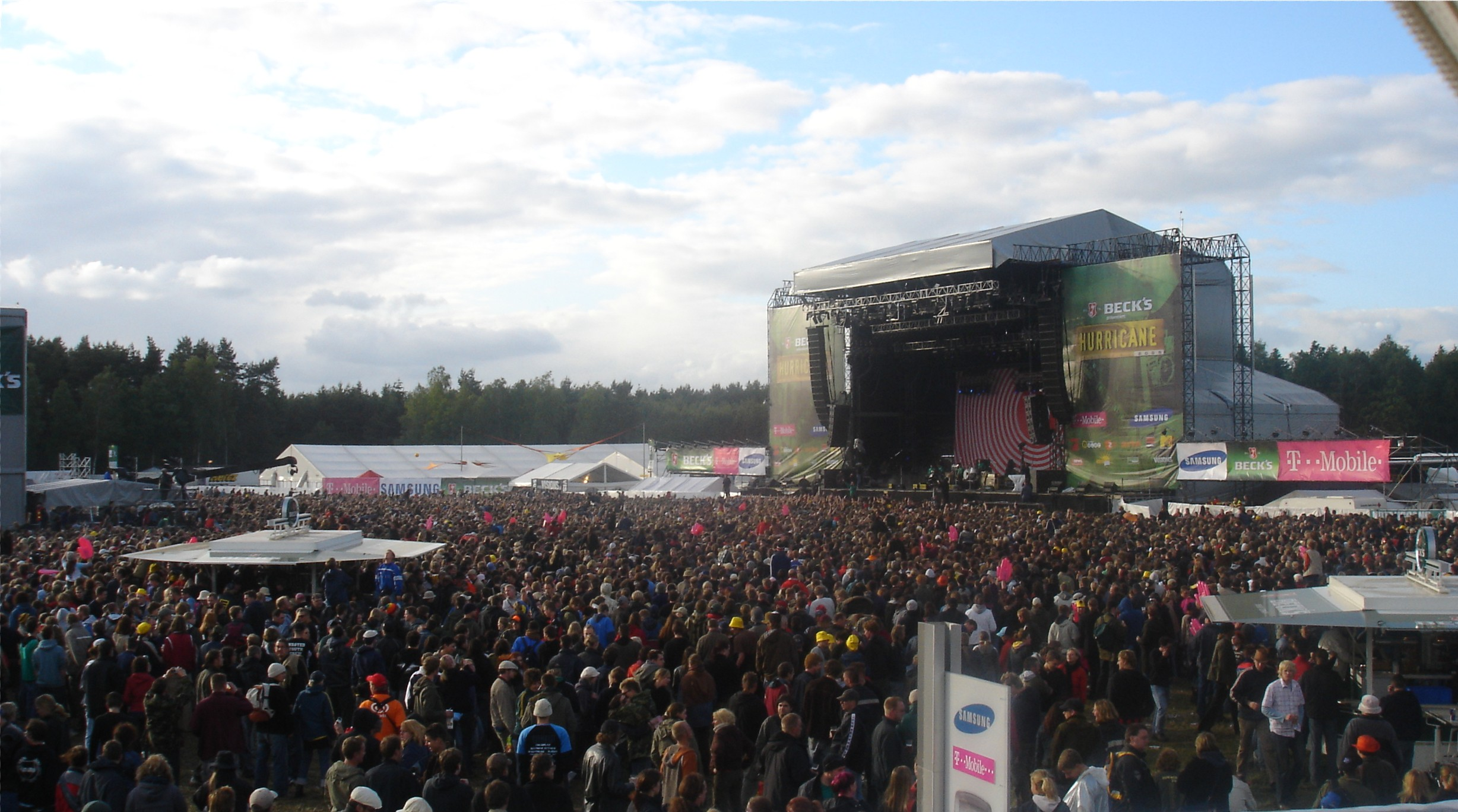 Die Green Stage auf dem Hurricane 2005. Es spielen gerade die Beatsteaks. Aufgenommen wurde das Ganze in der Minute in der das Samsung Zelt kurz geöffnet wurde.